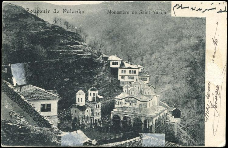 Осоговският манастир.